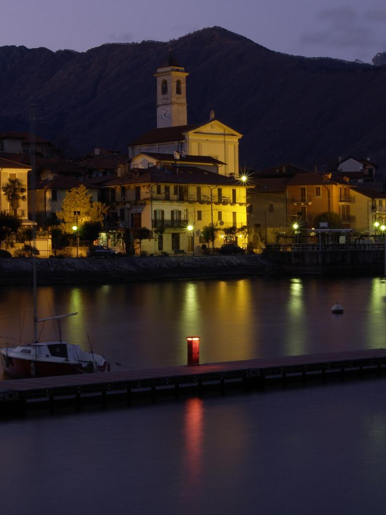 Feriolo